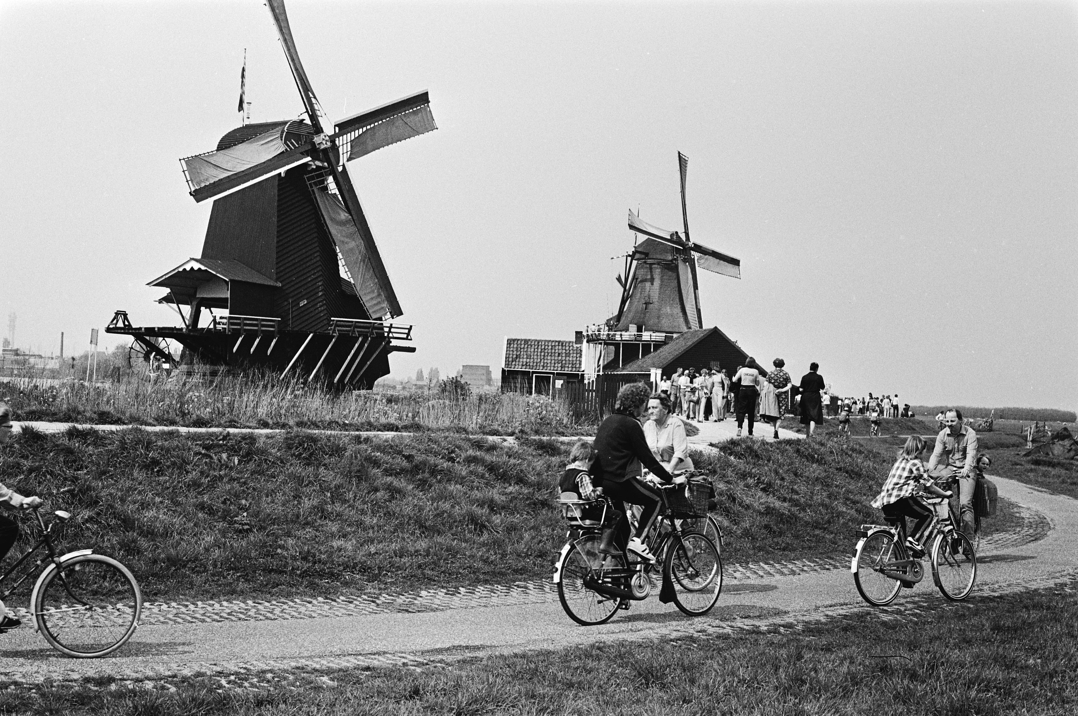 Collectie / Archief : Fotocollectie Anefo Reportage / Serie : [ onbekend ] Beschrijving : Nationale molendag en Landelijke fietsdag, veel fietsers bij molens op de Zaanse Schans Datum : 9 mei 1981 Trefwoorden : MOLENS, fietsdagen, fietsers Fotograaf : Antonisse, Marcel / Anefo Auteursrechthebbende : Nationaal Archief Materiaalsoort : Negatief (zwart/wit) Nummer archiefinventaris : bekijk toegang 2.24.01.05 Bestanddeelnummer : 931-4769 Reacties Geplaatst door Anoniemmoeky op 14 mei 2011 - 17:24. leuk weer zo,n molen/fiets dag heerlijk zo in een molen te zijn voel me daar erg thuis ik heb er al van jongs af aan komt door veel langes molens te wandelen met opa grAPppig ervan is dat hj het wandelen met mij niet deed om molens te zien maar graag een borreltje dronk in de kroeg vlak bij een molen hier in de buurt hahaha ...ik ben toen liefhebster geworden van alle molens heb veel kaarten en boeken verzameld en molens bezocht vind het een mooi iets dat aangedreven door de wind in werk wordt gebracht met vele grondstoffen vooral de zaansche schans is mijn idiale plekwens jullie alle een mooie tijd toe op deze geweldige machines helemaal top onze nederland met zijn prachtige molens mogen niet uit het beeld verdwijnen dat nooit!!!...vriendelijke groet een grote liefhebster uit het westen van nederland...